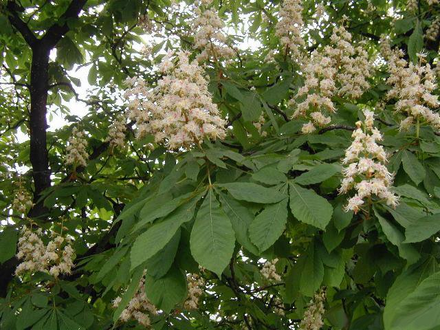 Aesculus hippocastanum